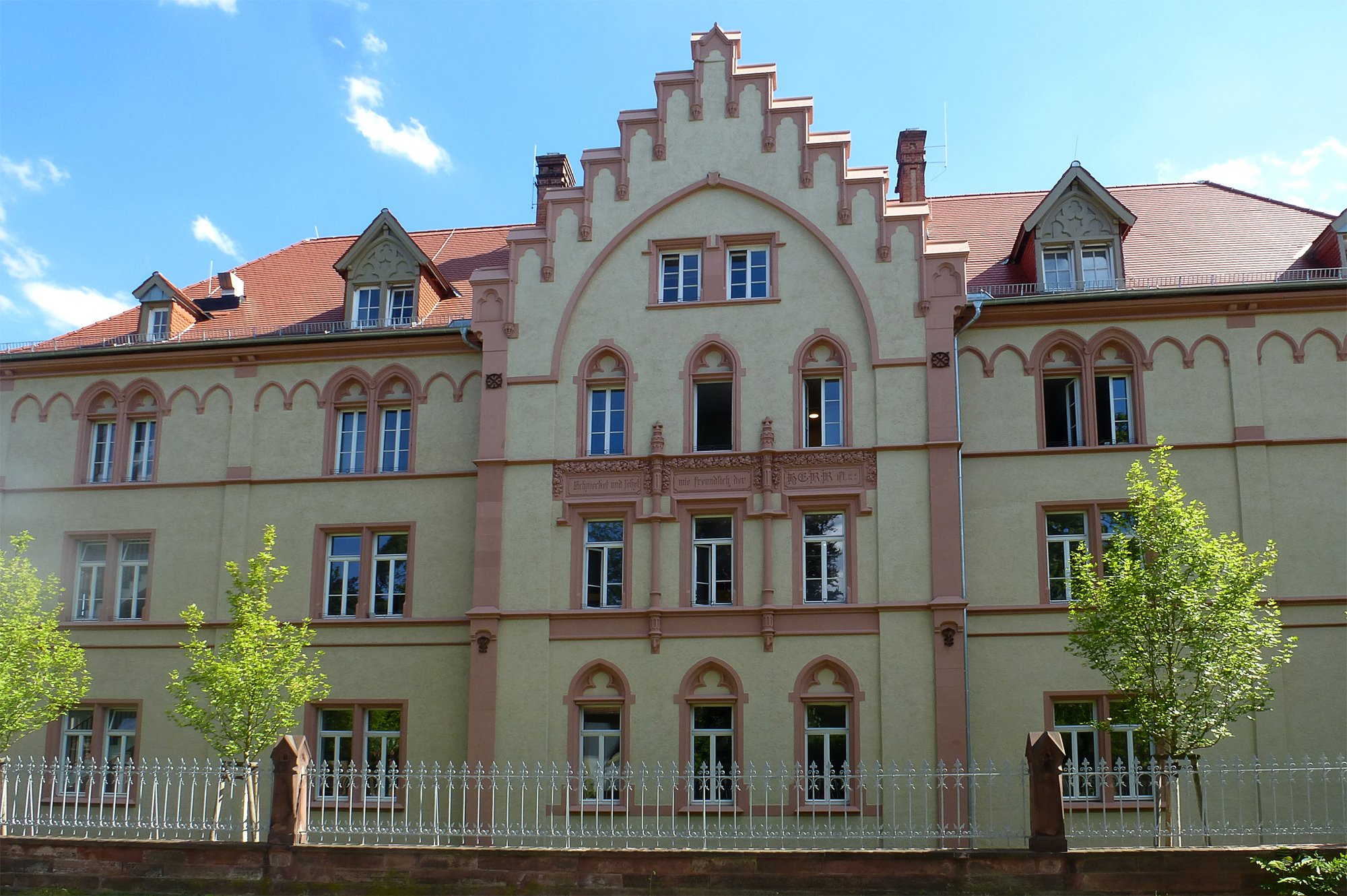 Denkmalgeschütztes Gebäude in Darmstadt, Erbacher Straße 27